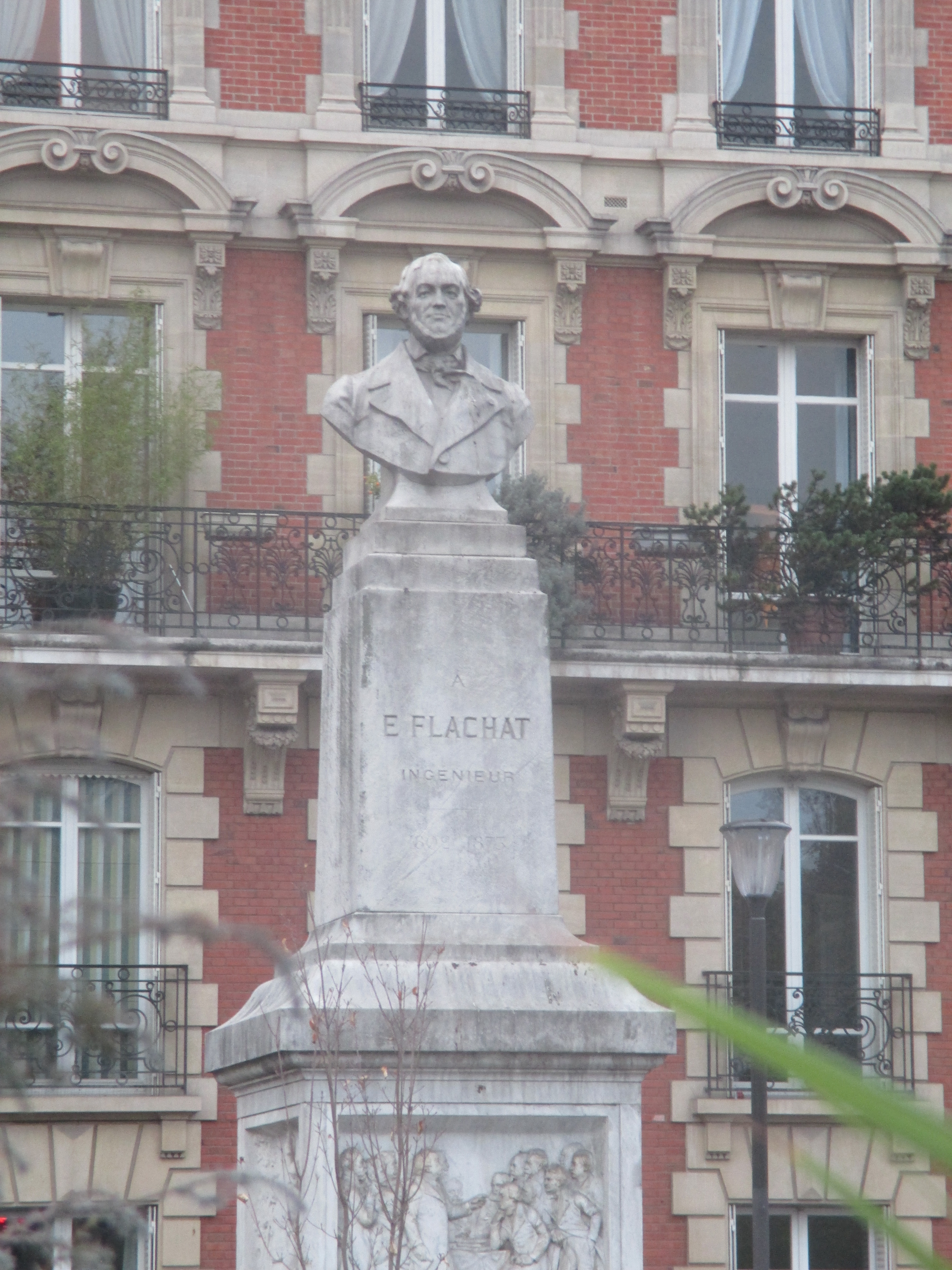 Buste d'Eugène Flachat au coin du boulevard Pereire et de la rue Verniquet dans la XVIIe arrondissement de Paris. Sculpteur: Alfred Boucher (1897).